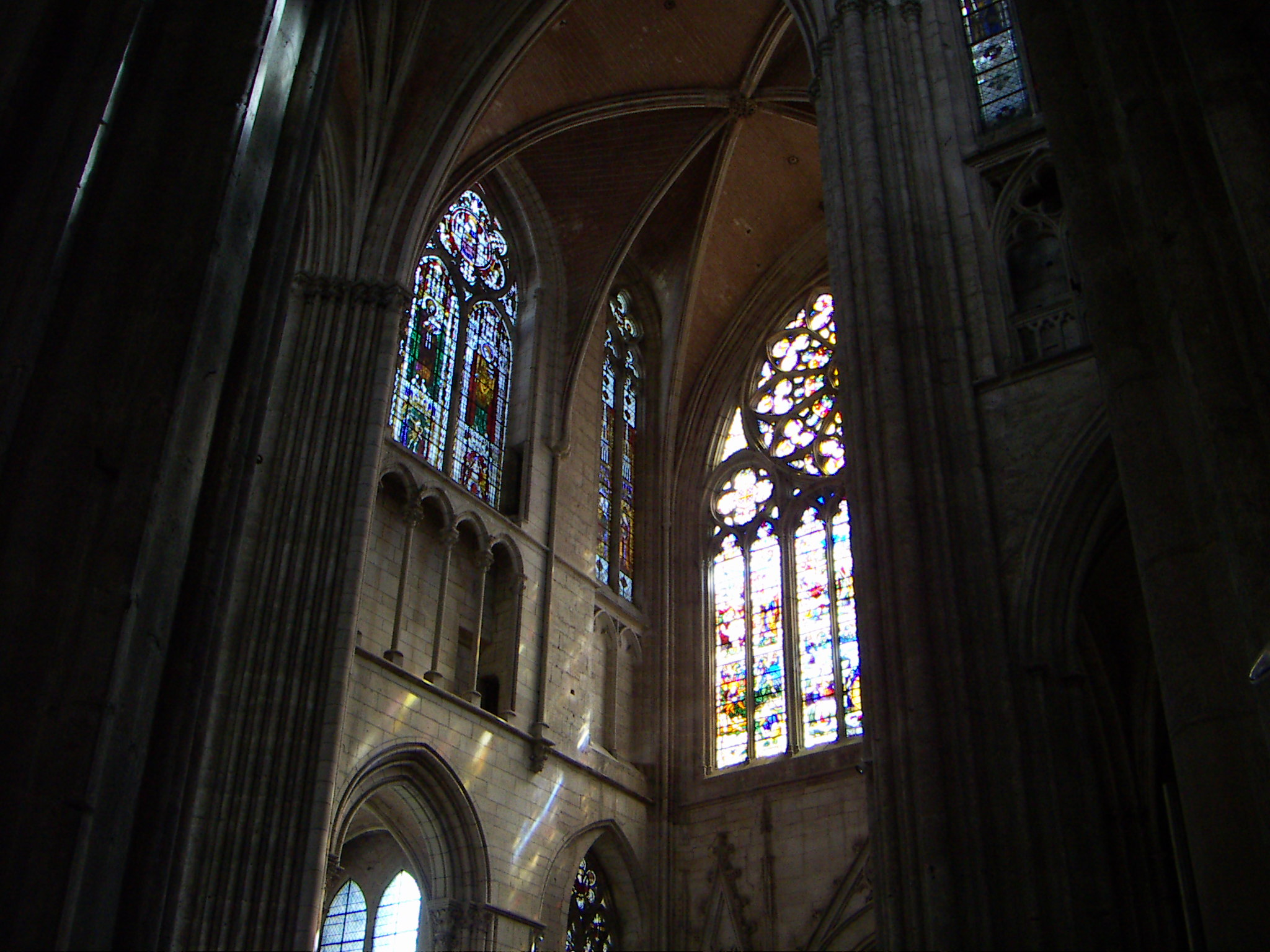 Auxerre, Kathedrale Saint-Étienne, Querhaus